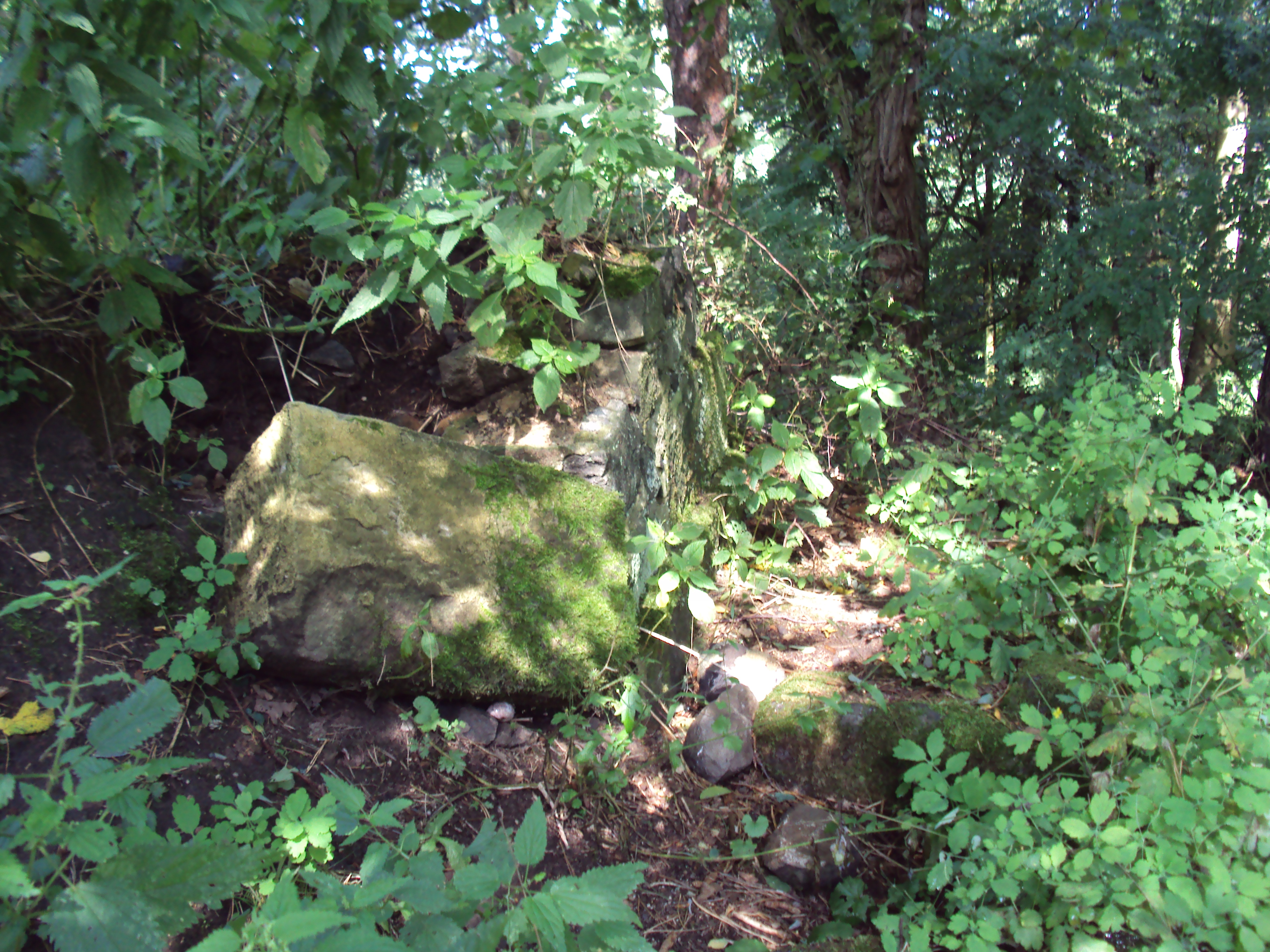 Na zarostlém vrcholu Vinného vrchu u obce Horní LInchava jsou zbytky hradu Klinštejn a pozdějšího vyhlídkového altánu